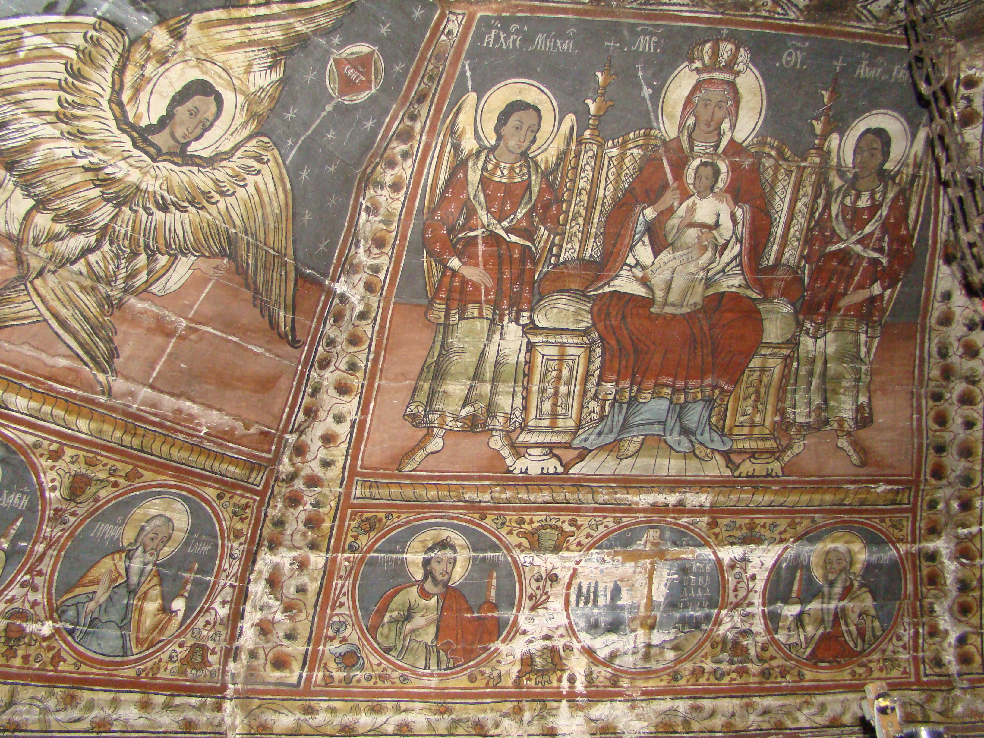 Biserica de lemn din Valea Largă-Alba